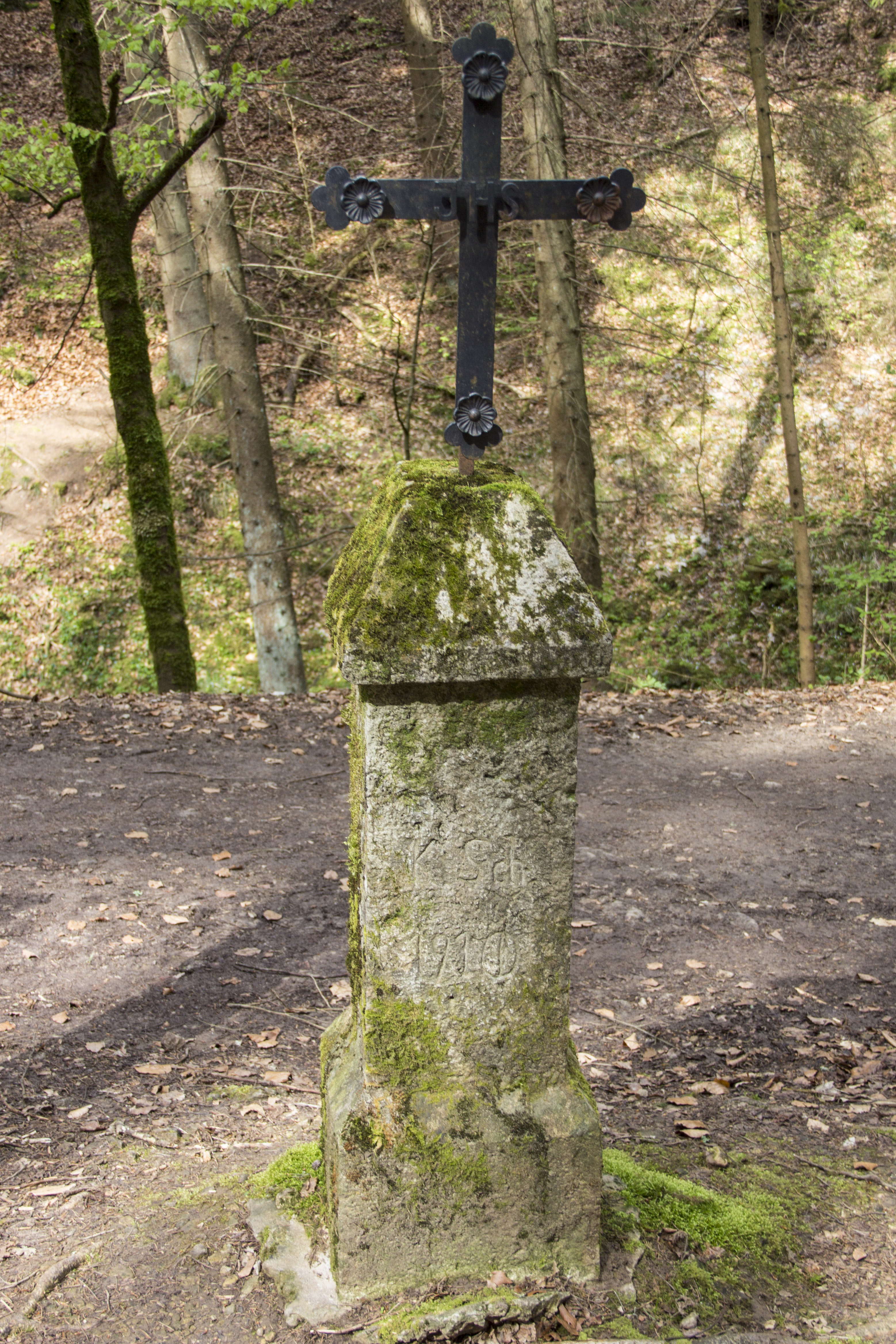 Wegkreuz